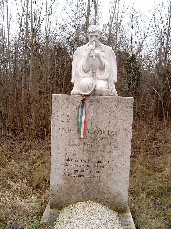 Bakonyi Károly (1873–1926) író, operett-librettista, miniszteri tanácsos sírja Budapesten. Kerepesi temető: 39-1-33. Horvay János szobrász műve.